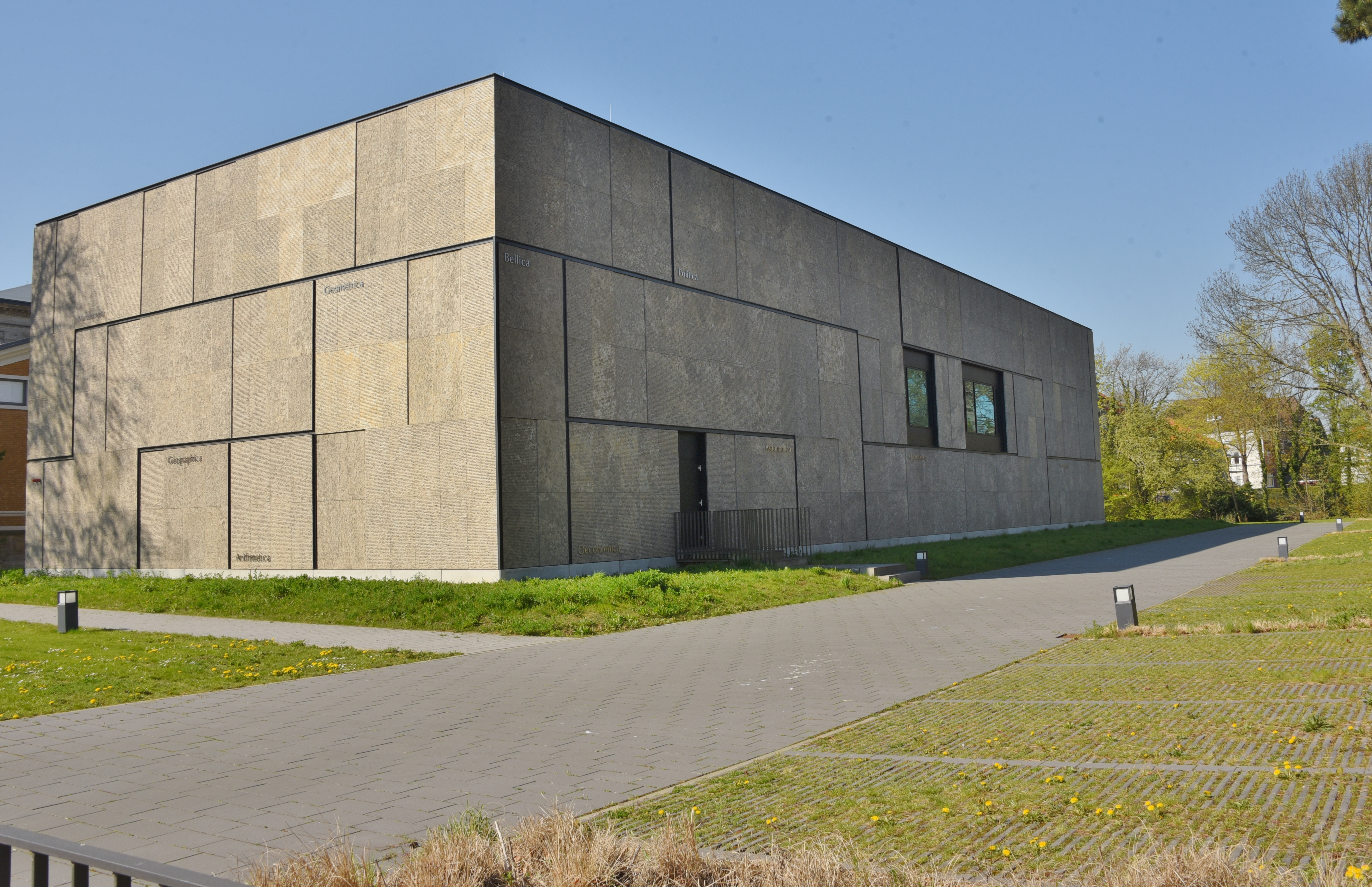 Magazingebäude Herzog August Bibliothek, Architekten Burckhardt+Partner